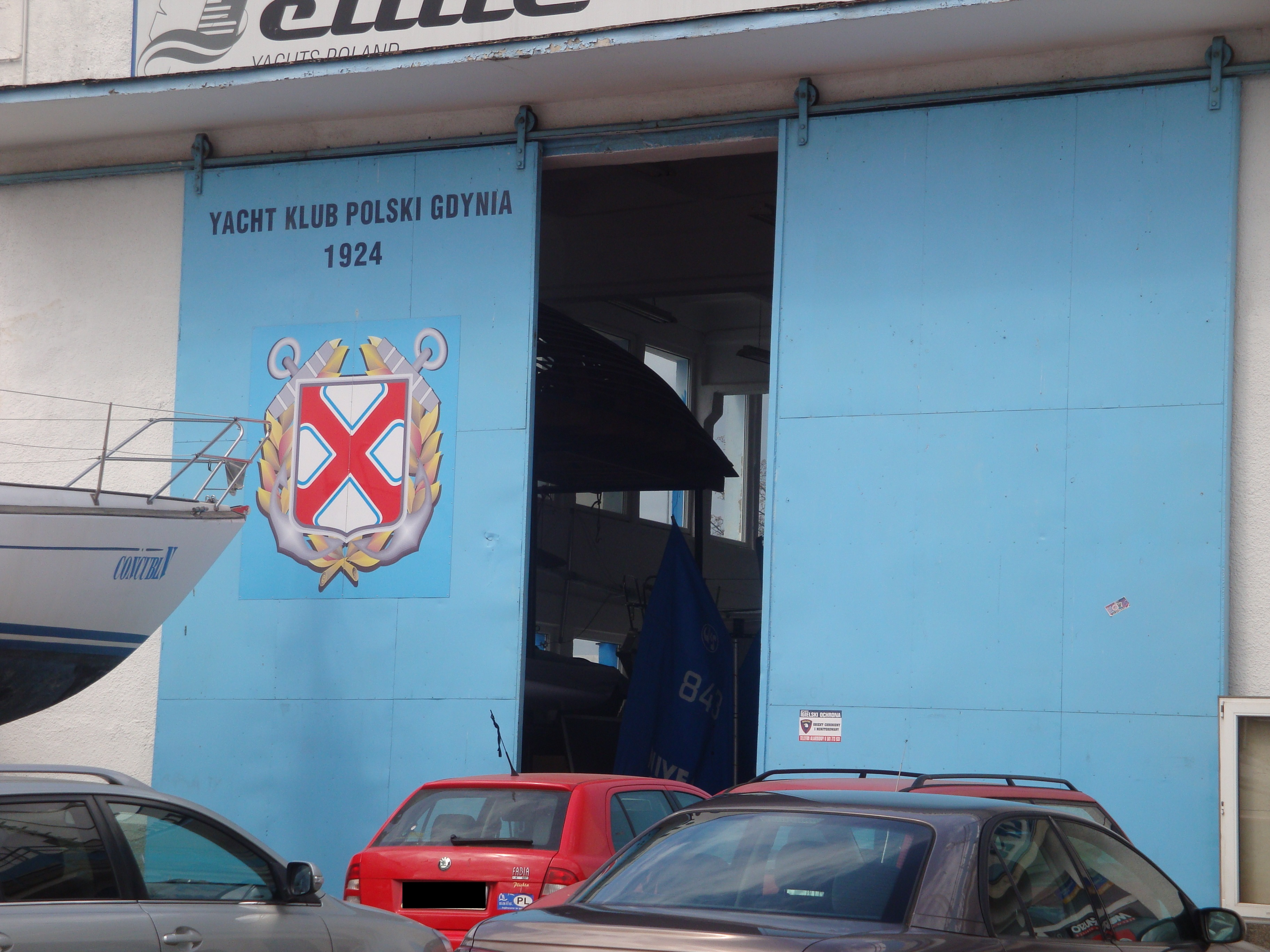 Wrota hangaru do przechowywania jachtow Yacht Klubu Polskiego w Gdyni z herbem jachtklubu.